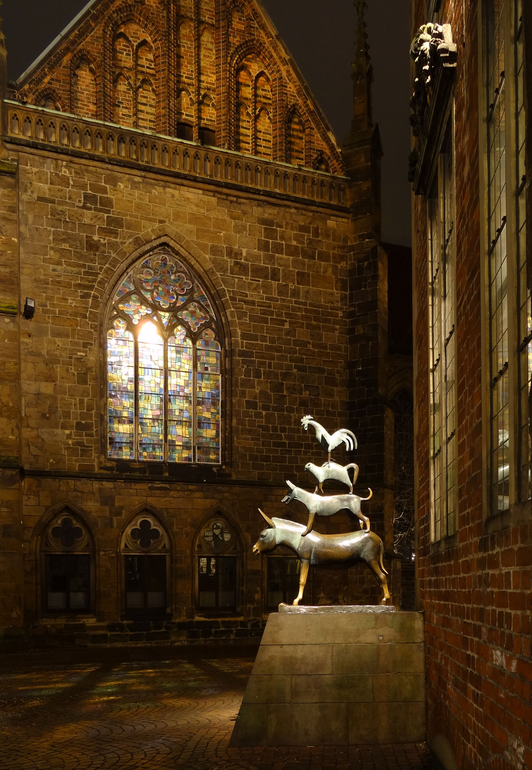 Bremer Stadtmusikanten – Denkmal am Bremer Rathaus in Bremen, Deutschland. Im Hintergrund die Liebfrauenkirche. Die Skulptur stammt von dem Bildhauer Gerhard Marcks und wurde 1953 aufgestellt.